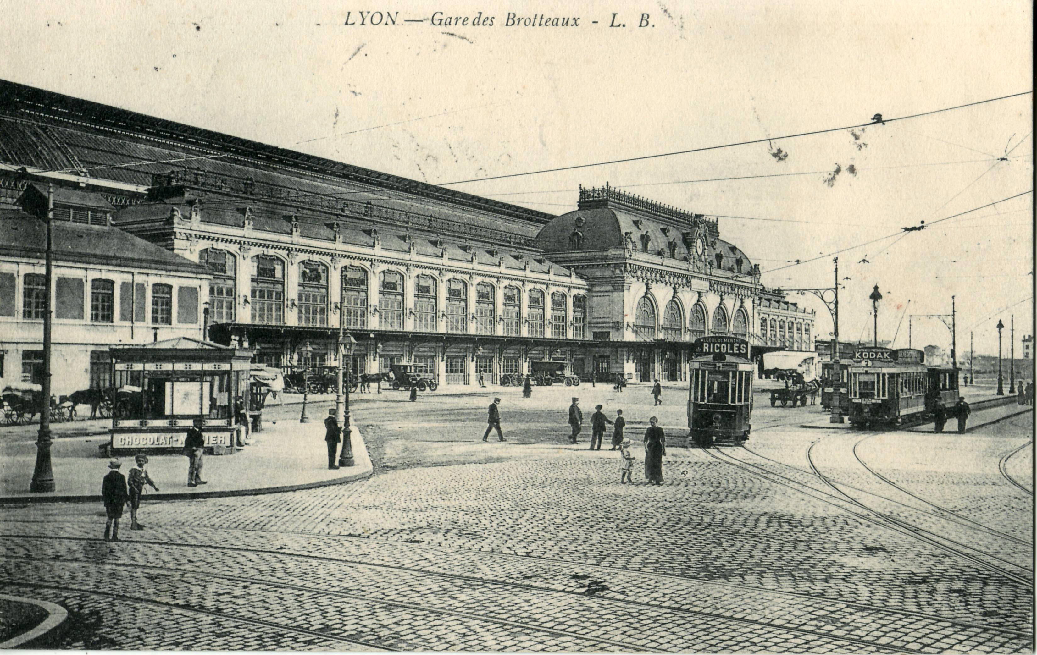 Carte postale ancienne éditée par LB : LYON - Gare des Brotteaux